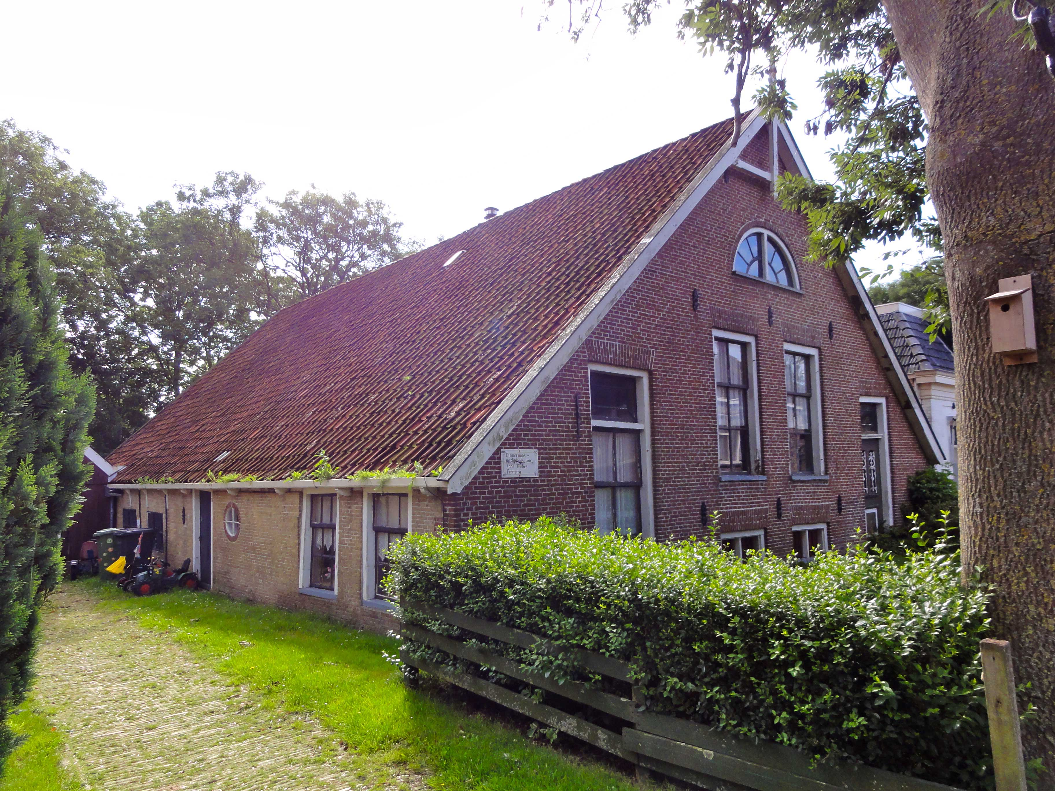 Timmerwerkplaats van Inne Rinkes Veenstra, Buren 5 te Ferwoude